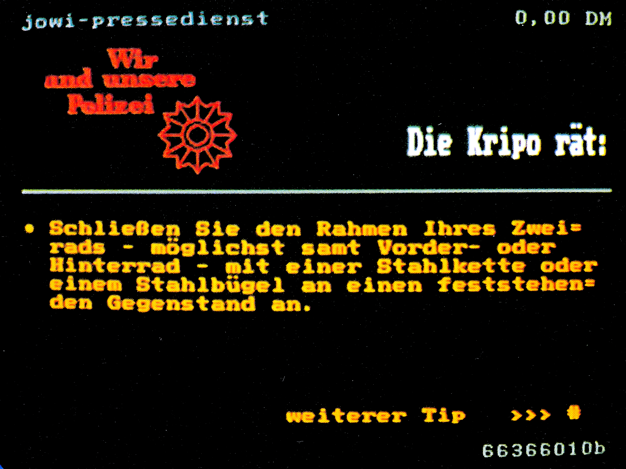 Infobroschüre des Bundesministerium für das Post- und Fernmeldewesen, Referat für Öffentlichkeitsarbeit, Juli 1985, S. 11.jpg